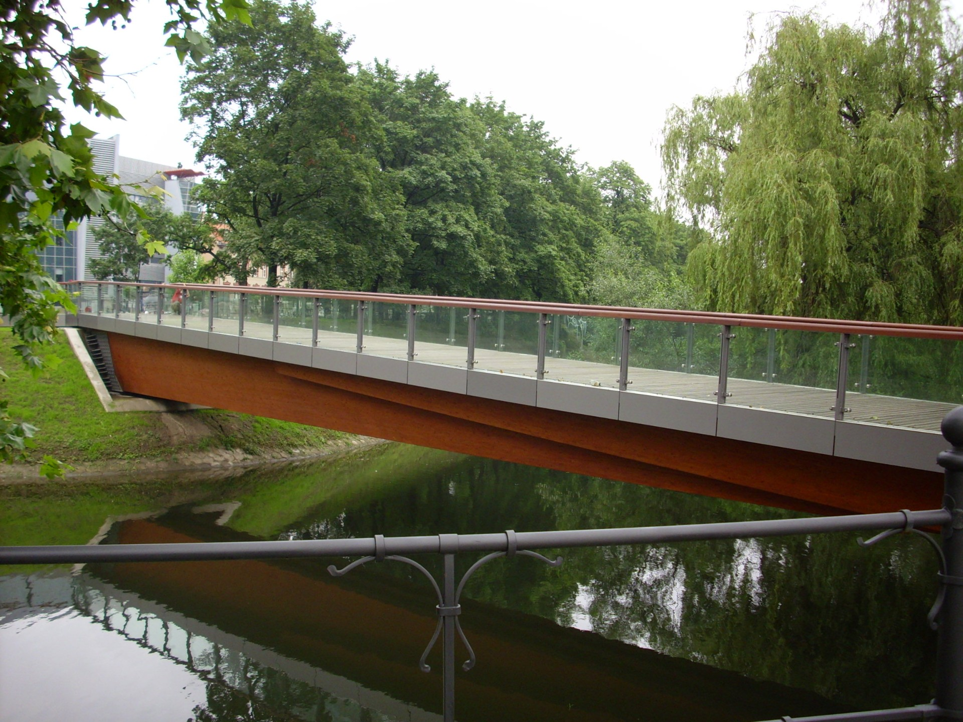 Wrocław. Wybudowana w roku 2009 kładka nad fosą (tzw. Psia Kładka[1]) łącząca plac Orląt Lwowskich z ul. Włodkowica. Długość – 43,6 m, szerokość 3,8 m; konstrukcja kładki (dźwigary, poprzecznice) wykonana jest z drewna klejonego.